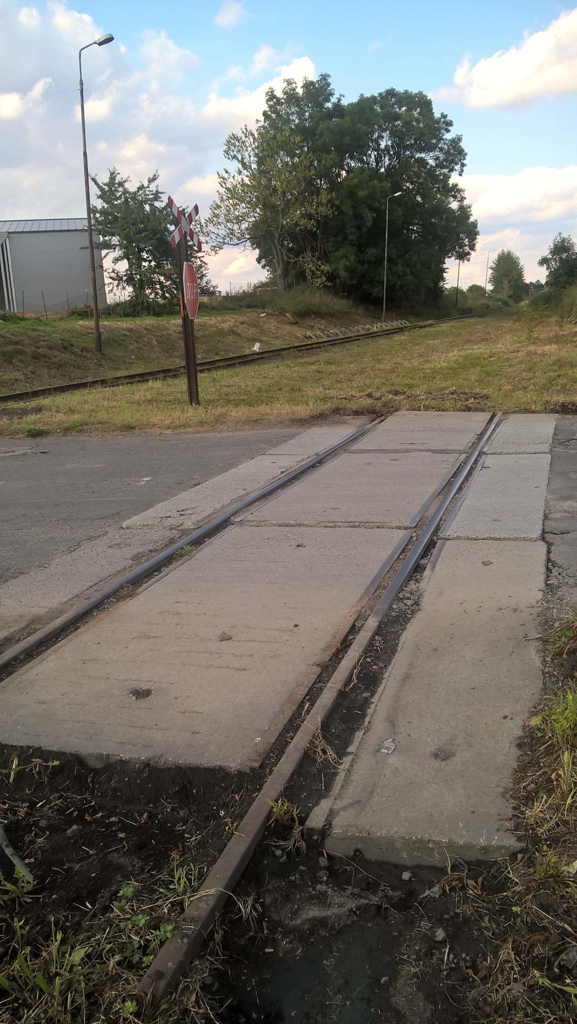 Pozostałości drugiego toru linii kolejowej nr 288 niedaleko stacji Pakosławice